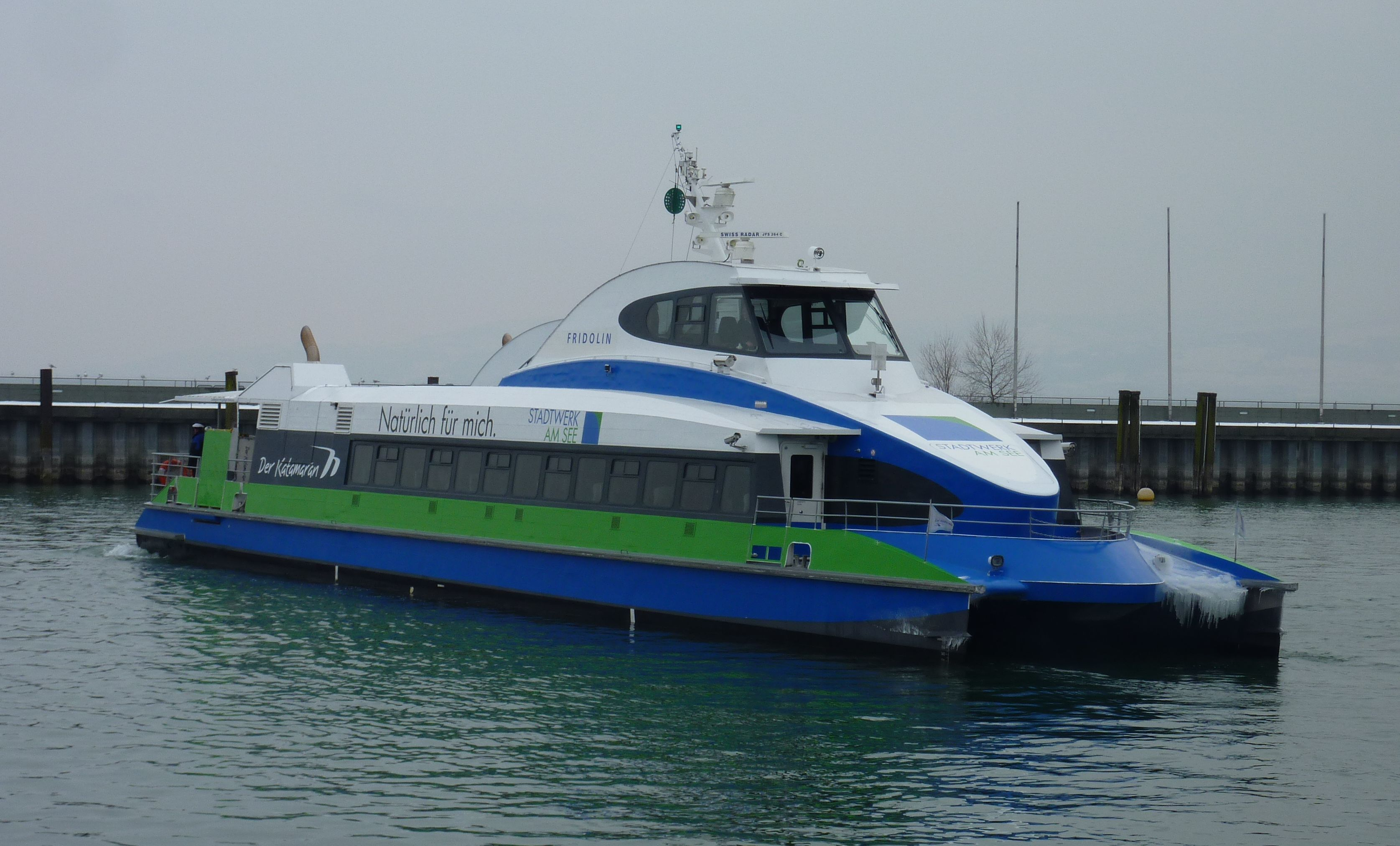 "Fridolin" in Friedrichshafen mit neuem Design.